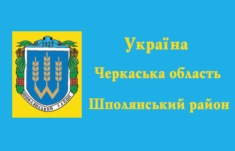 Прапор Шполянського району